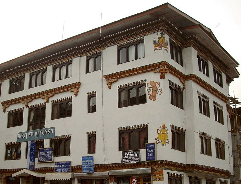 Bhutan Kitchen Restaurant in Thimphu, Bhutan